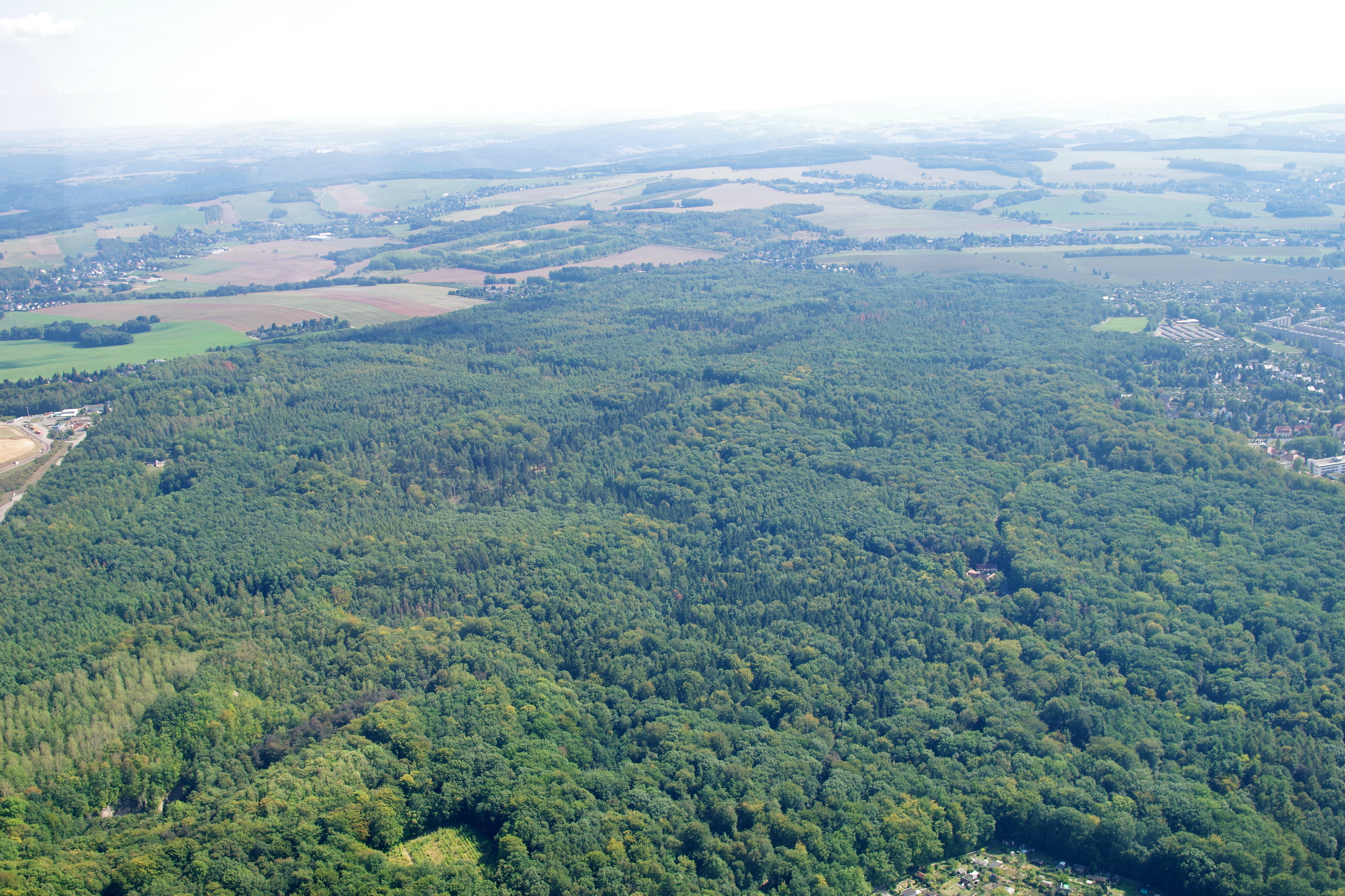 Zeisigwald